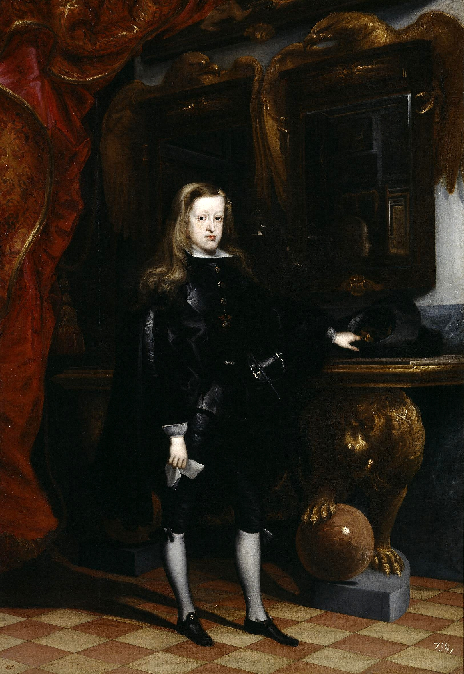 Retrato del rey Carlos II de España (1661-1700), a los diez años de edad y posando en el Salón de los Espejos del Real Alcázar de Madrid.